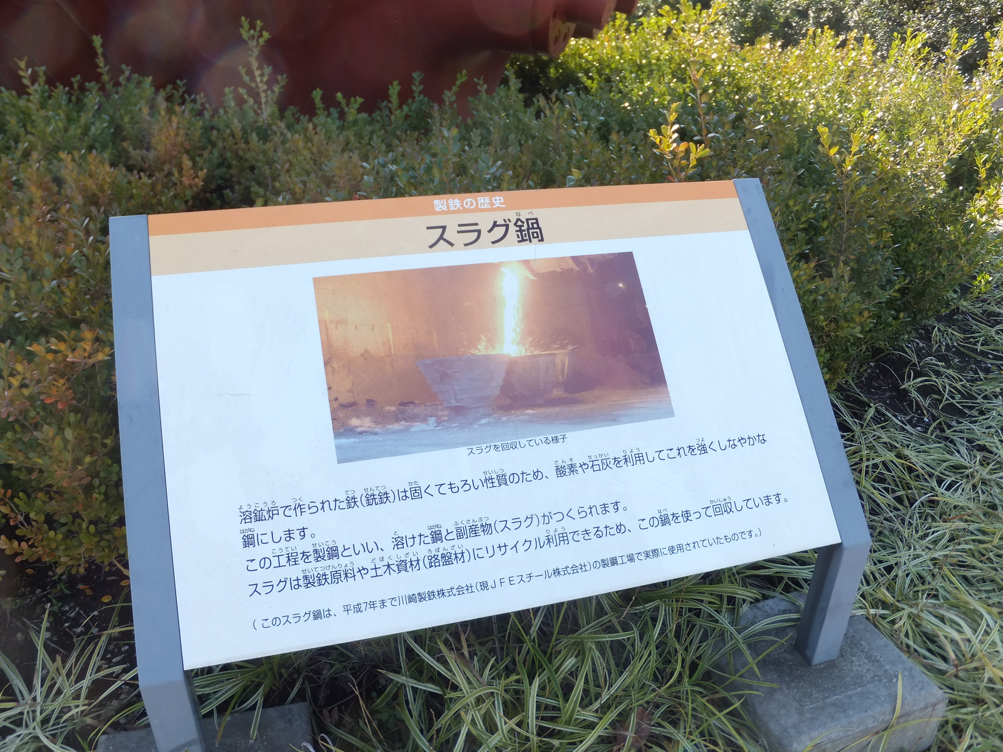 ハーバーシティ蘇我の一角にある川崎鉄なべ広場公園（千葉市中央区）。ハーバーシティ蘇我はJFEスチール東日本製鉄所（川崎製鉄千葉東工場）の敷地の一部を転用して整備された再開発地区で、かつて製鉄所で使われたスラグ鍋を設置した公園が整備された。